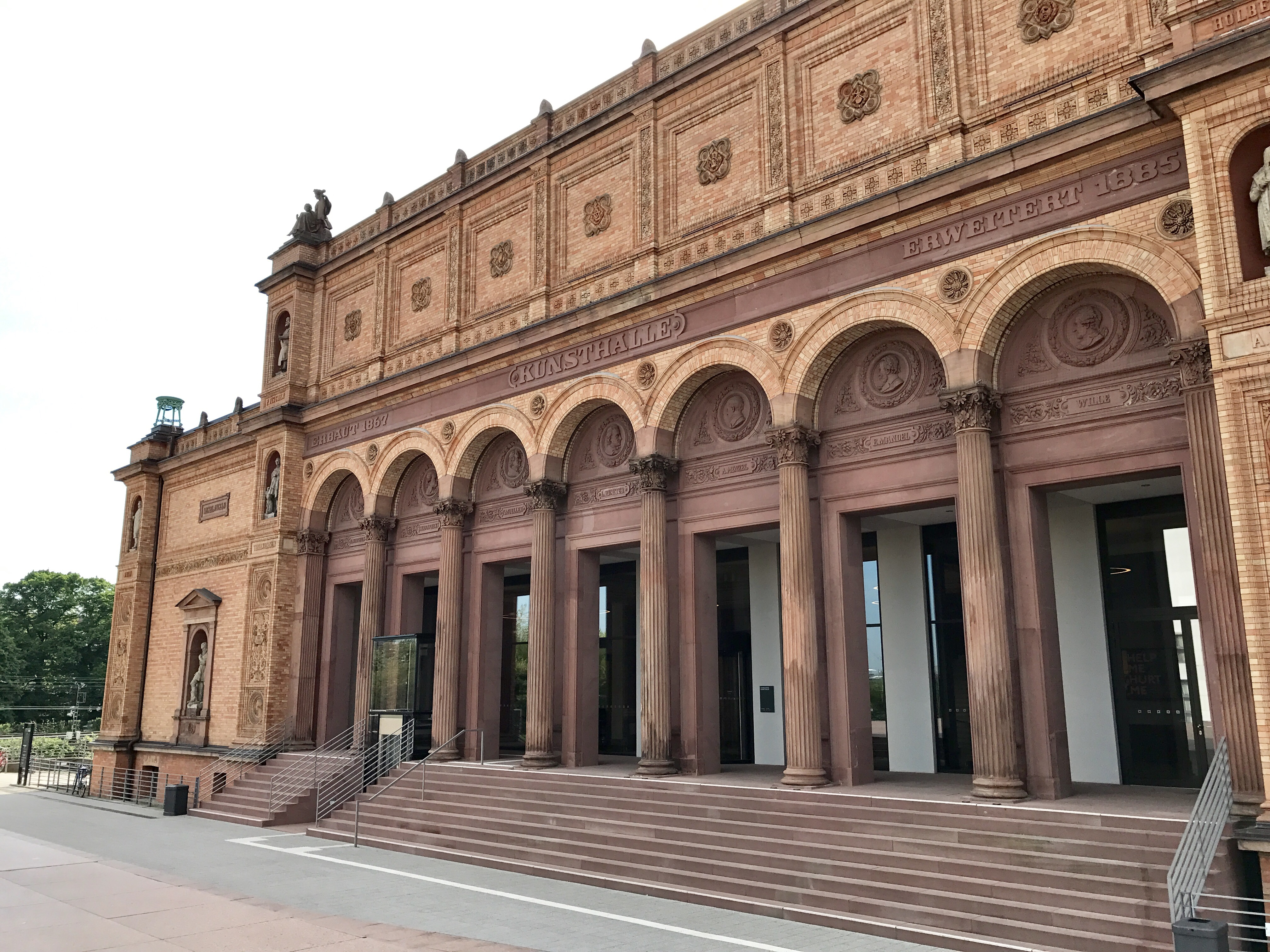 Hamburger Kunsthalle - Eingangsportal des Gründungsbaus, ornamentgeschmückte Backsteinbau im Stile der italienischen Renaissance This is a photograph of an architectural monument.